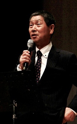 DB잡콘서트 응답하라 데이터베이스 청춘이여! 만족과 타협하지 말라! (Kim Seong-geun)